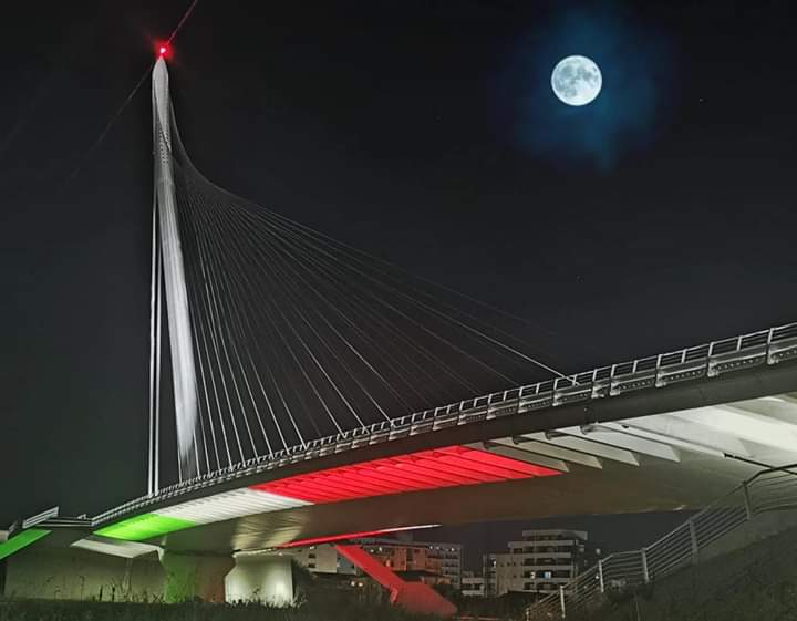 Ponte San Francesco da Paola a Cosenza durante il periodo di pandemia Covid 19 a marzo 2020